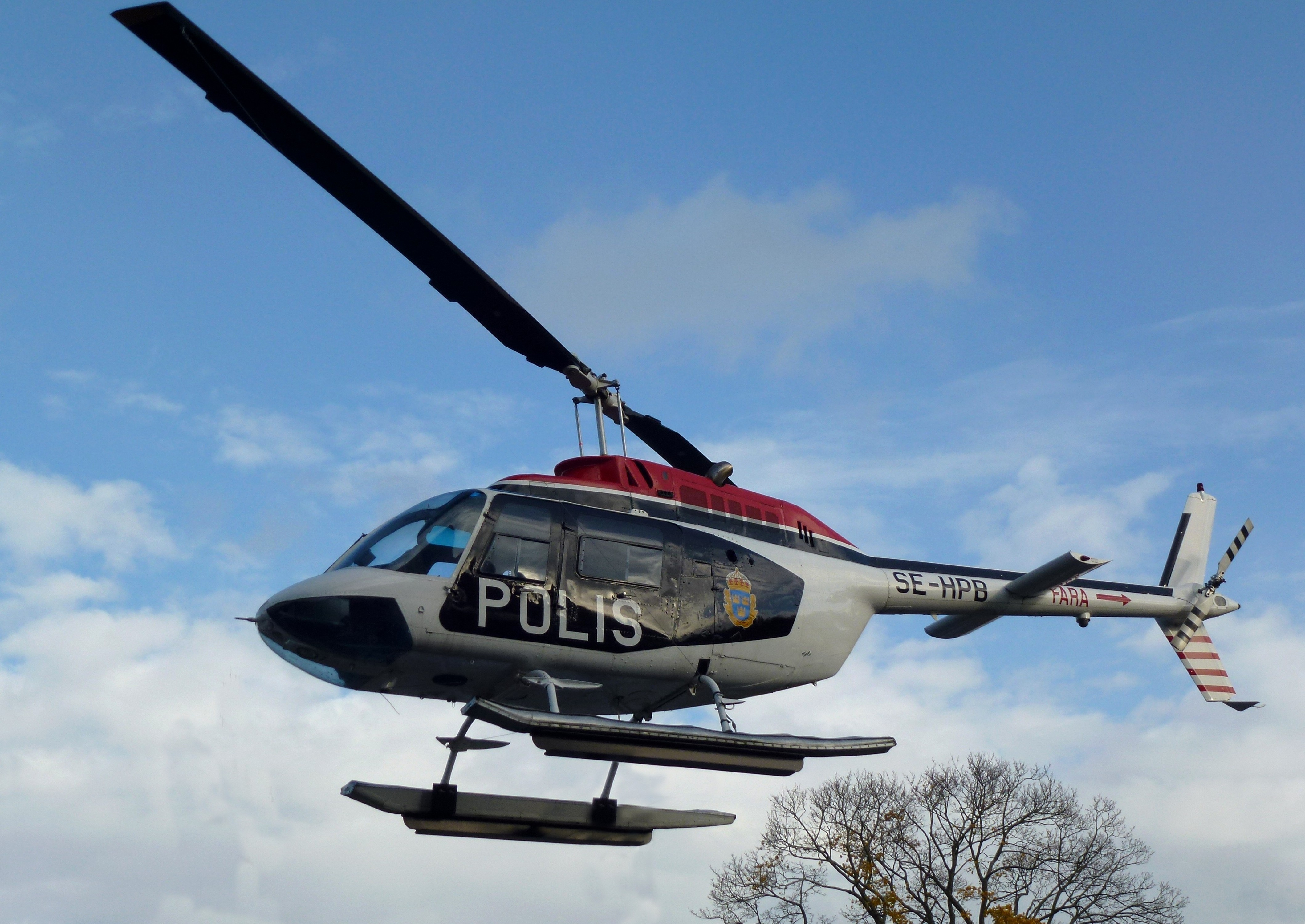 Polishelikopter vid Polismuseet (stödet som helikoptern står på är bortretuscherat)